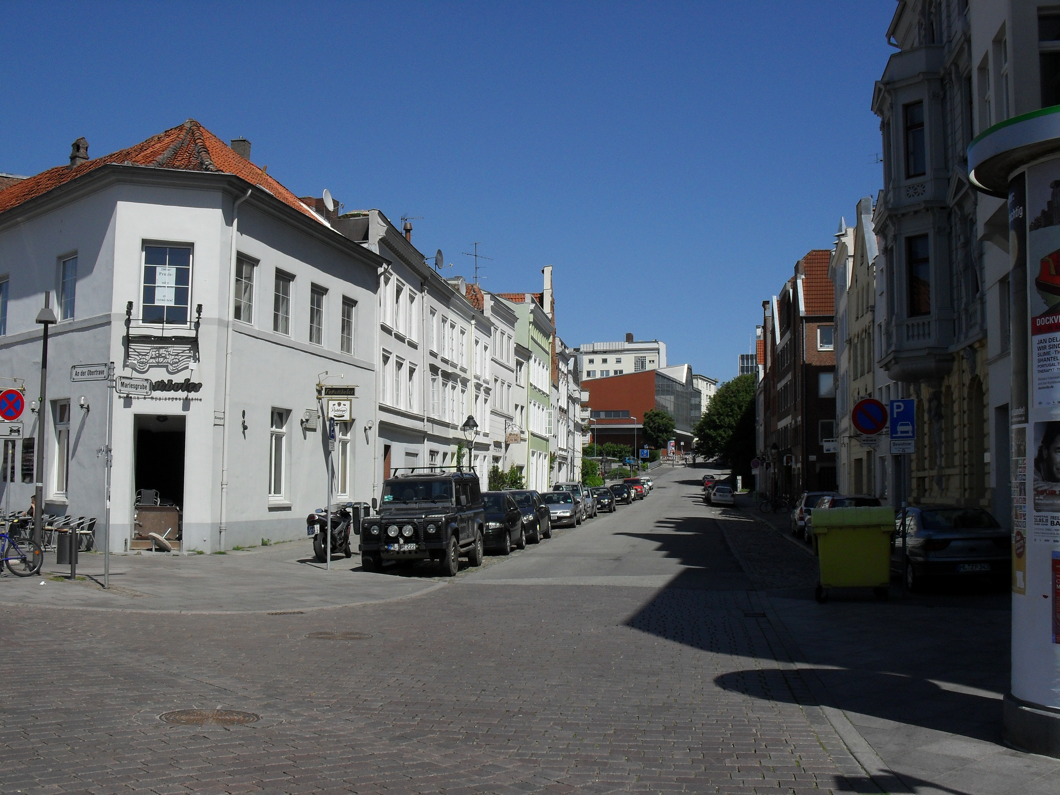 Die Marlesgrube in Lübeck